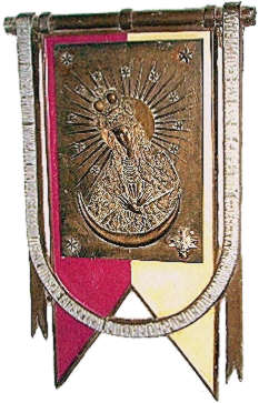 Tablica w kościele św. Andrzeja Boboli w Londynie. Ryngraf 1 pułku ułanów krechowieckich